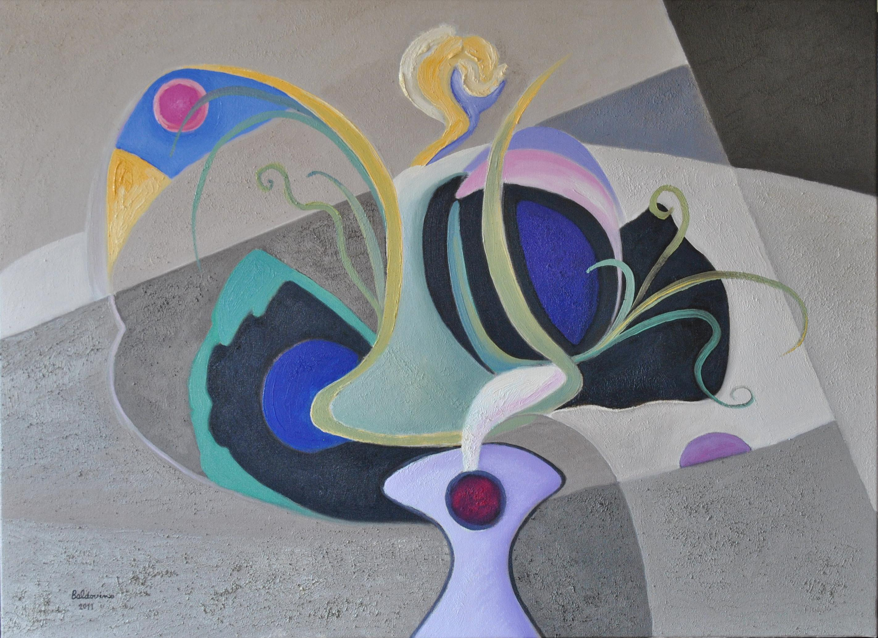 Ángel Baldovino.Brotes verdes o la mirada del mar.Óleo sobre tela.100x73.2011